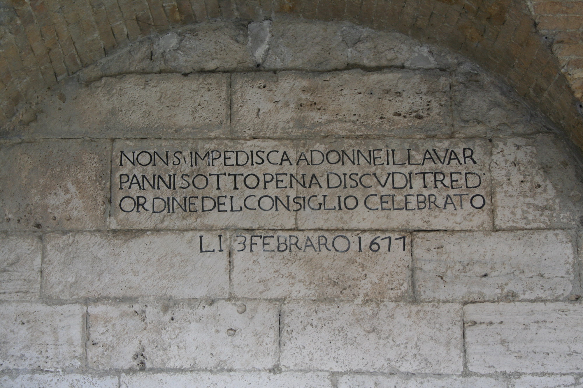 Lavatoio pubblico di Ascoli Piceno, scritta del bando del 1677, esterno giorno, proprio scatto Sibilla.io "Utilizzo concesso" Ticket#2007040410014627 (ticket per le immagini) This file is licensed under Creative Commons 3.0 license